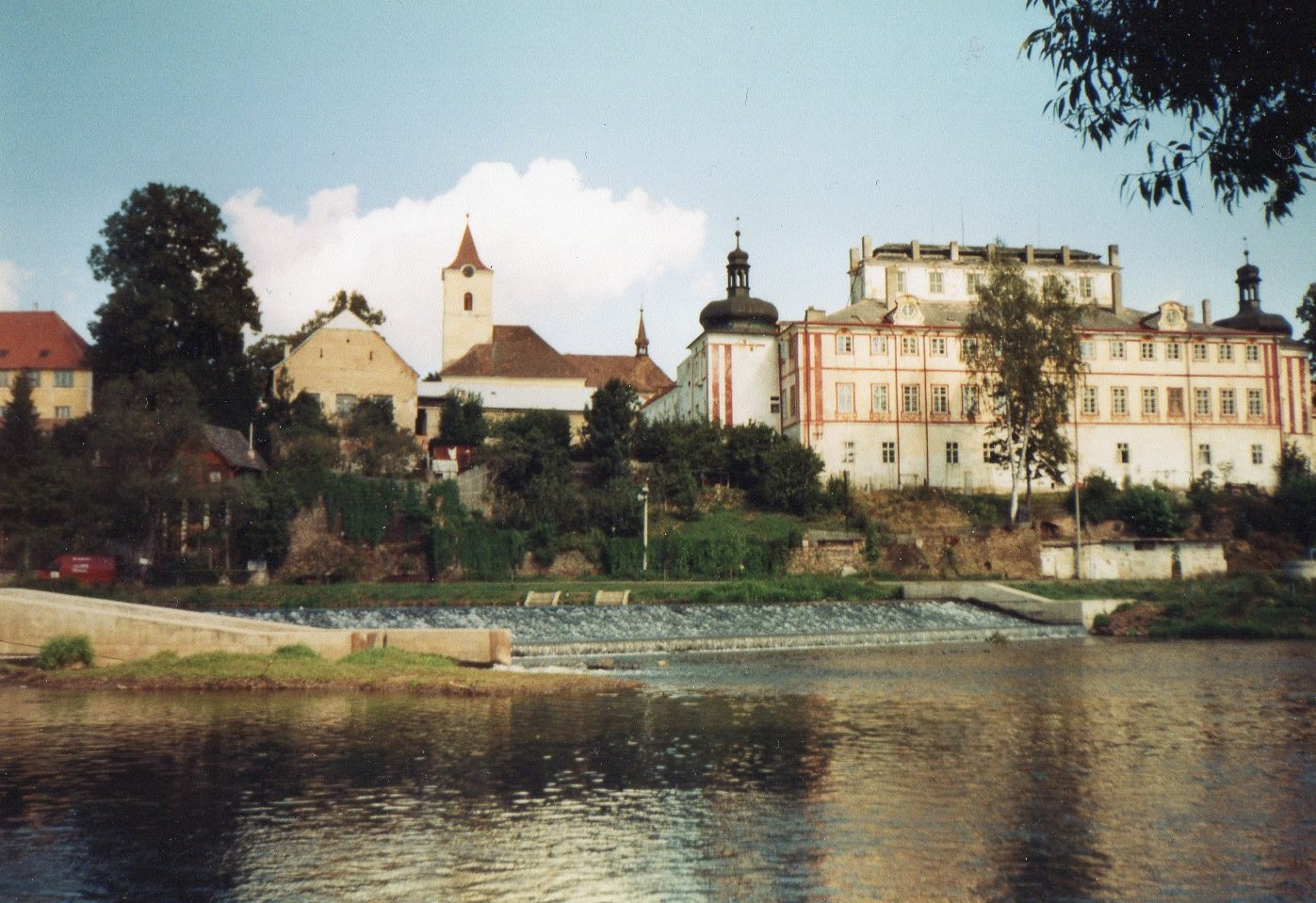 Kácovský kostel od řeky